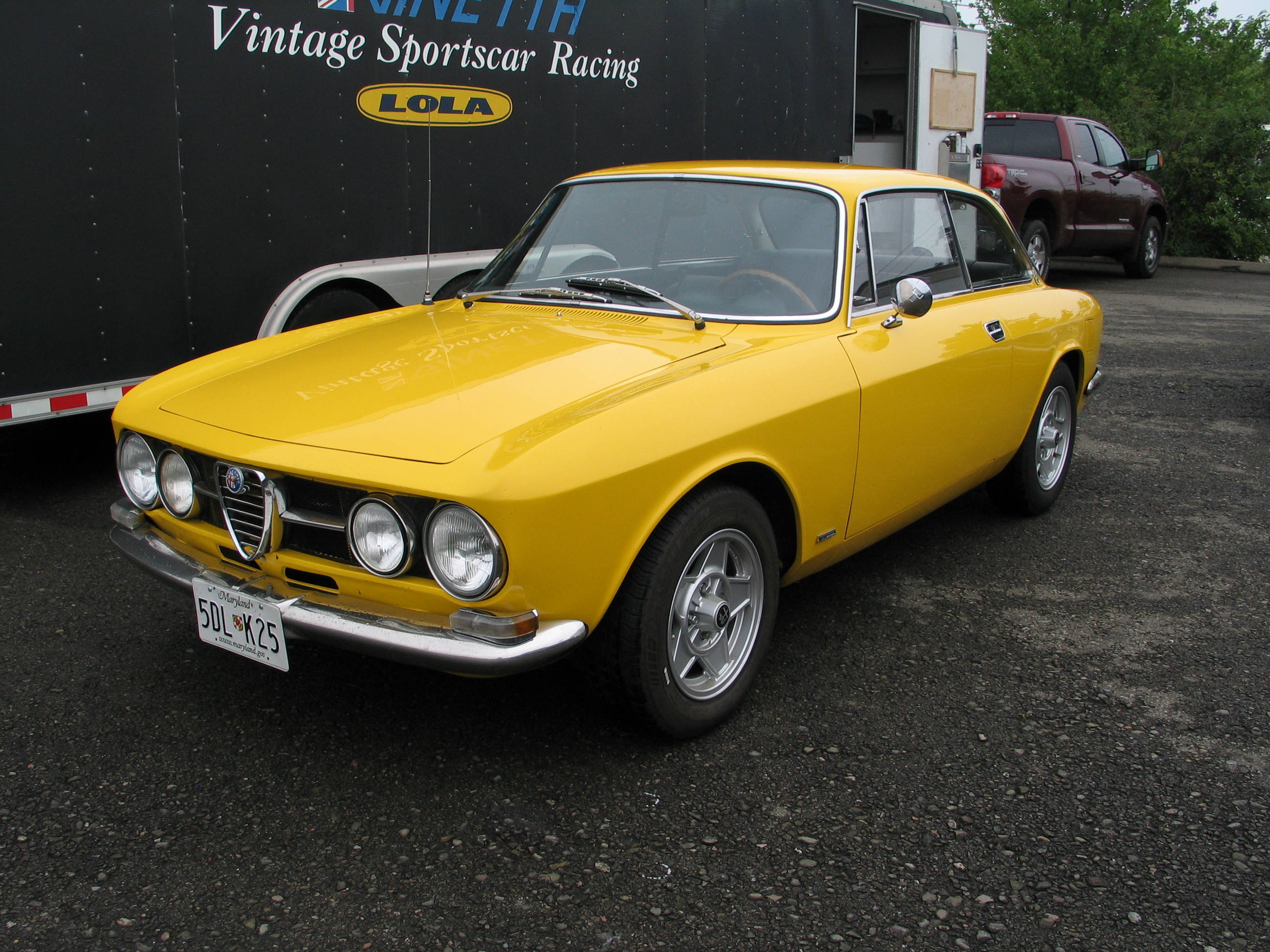 Alfa Romeo 1750 GT Veloce (2ª serie)